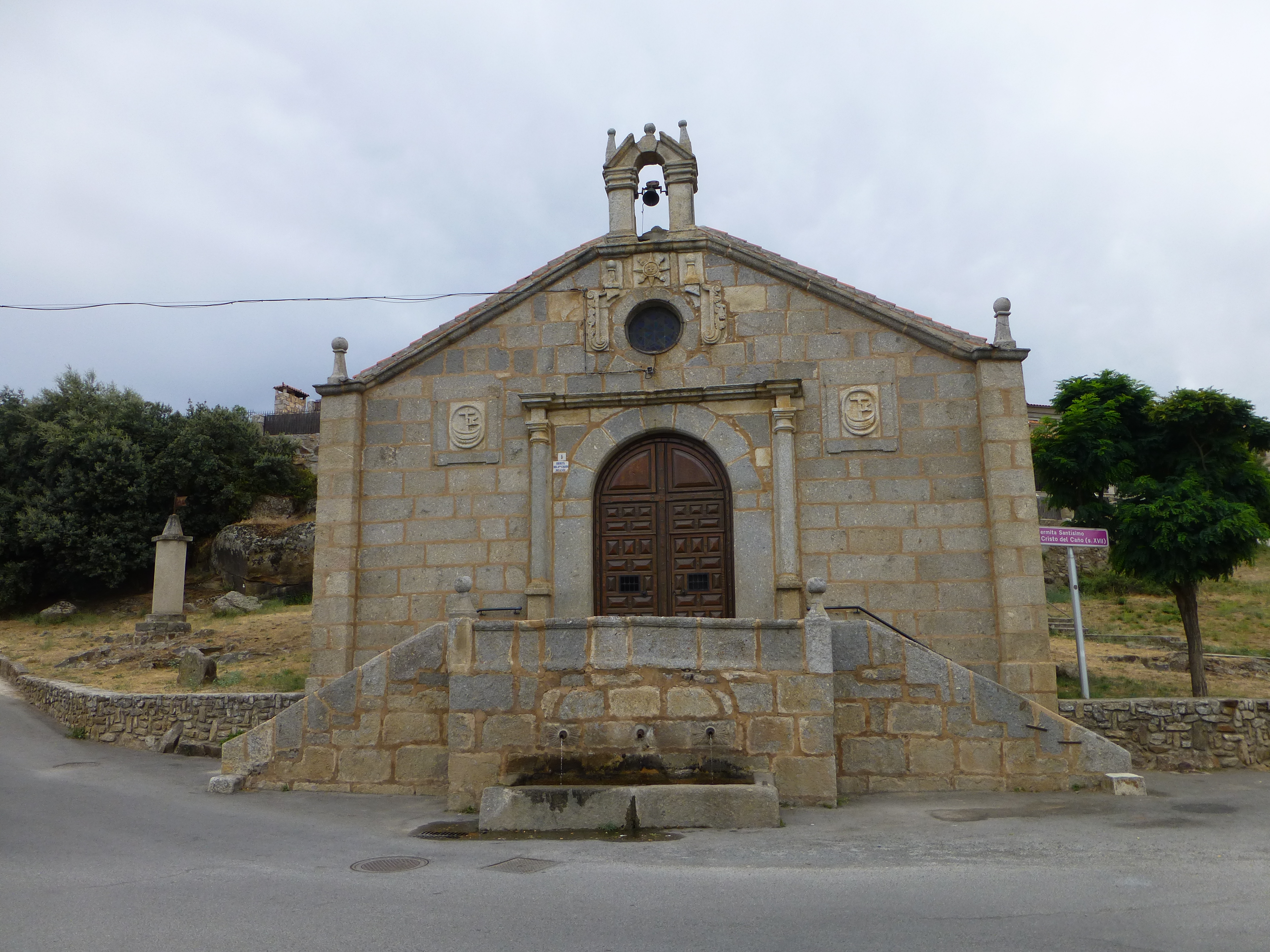 Ermita del Santísimo Cristo del Caño. Fachada. El Barco de Ávila, Castilla y León, España.